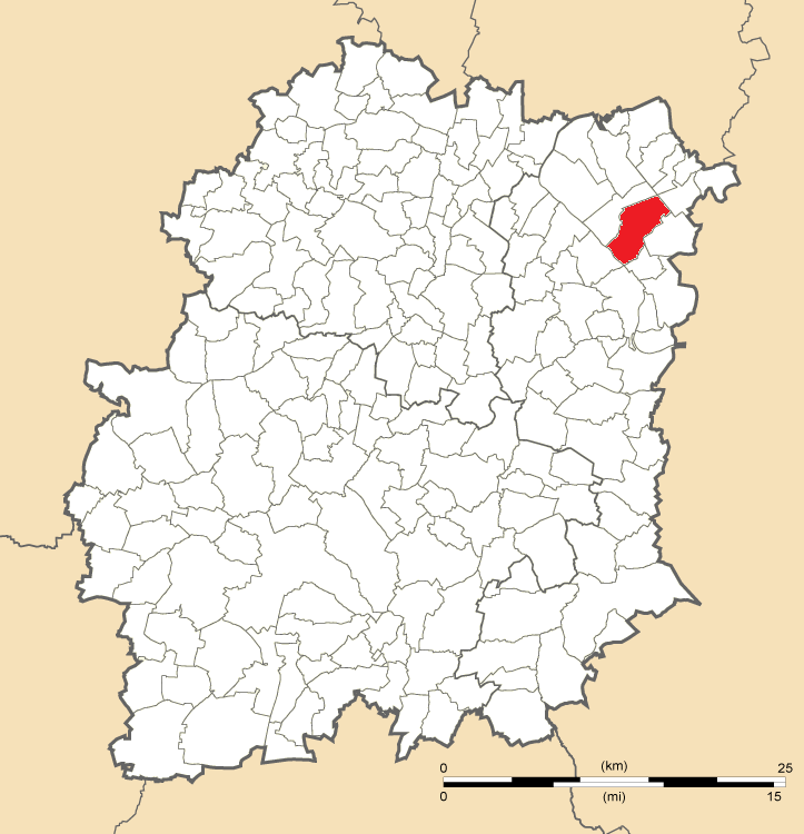 Carte de position d'Étiolles en Essonne (91)